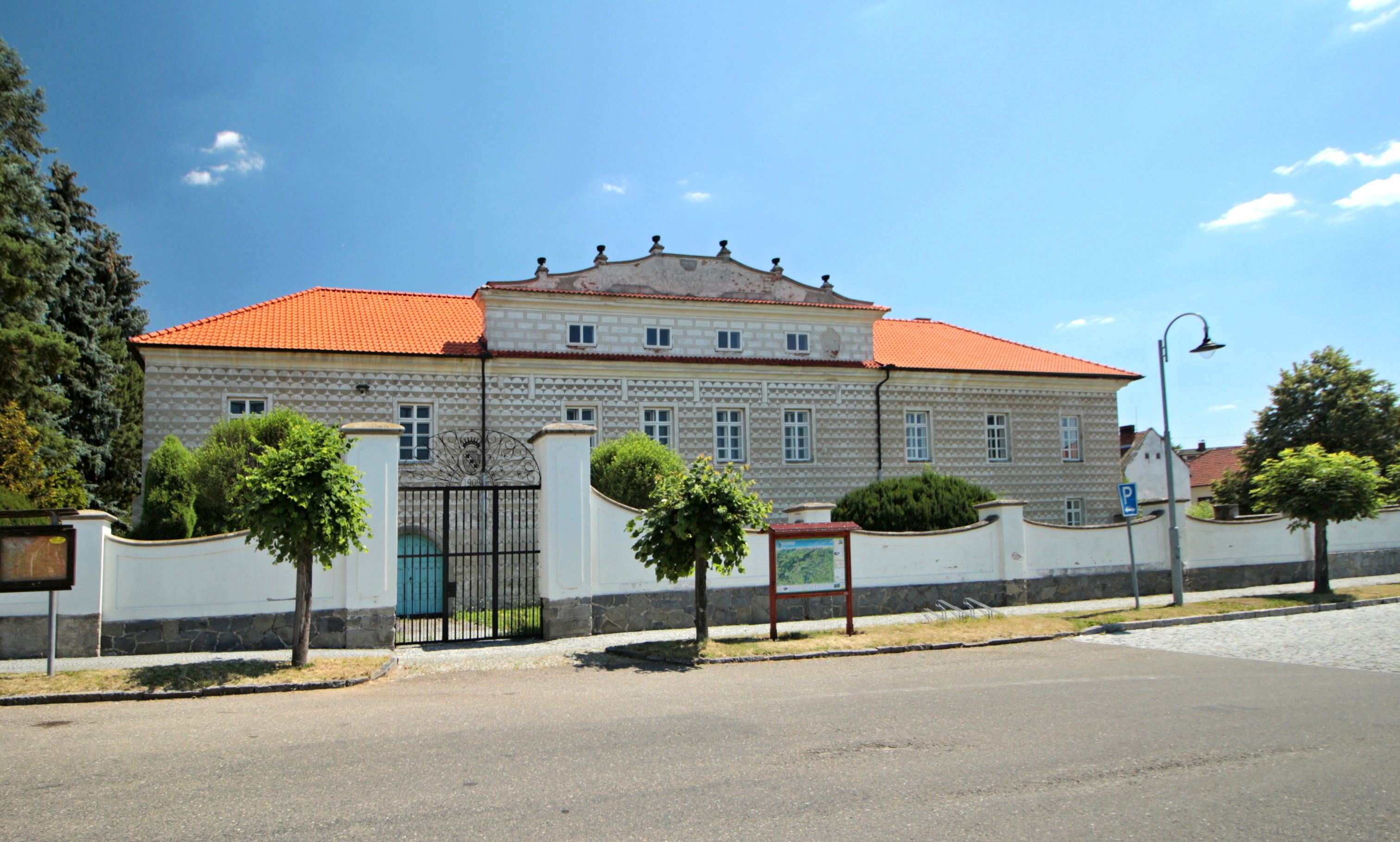 Zámek Kosova Hora